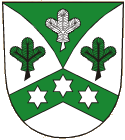 Znak obce Sosnová, okres Bruntál